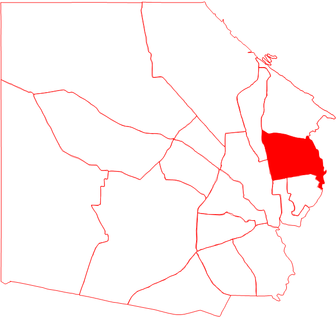 Ubicación de la parroquia Olegario Villalobos, en el municipio Maracaibo, estado Zulia, Venezuela